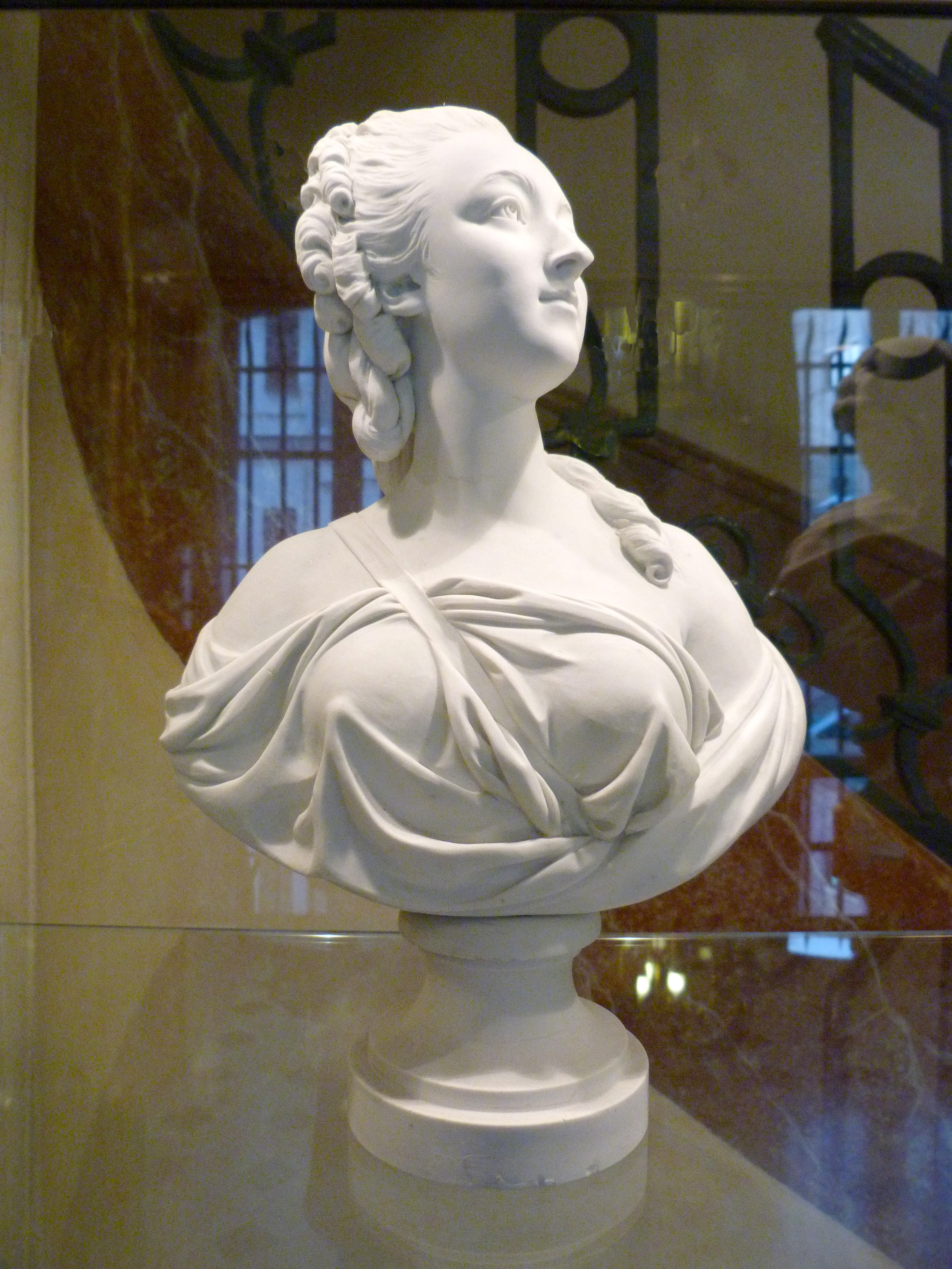 Sculpture d'après un modèle d'Augustin Pajou